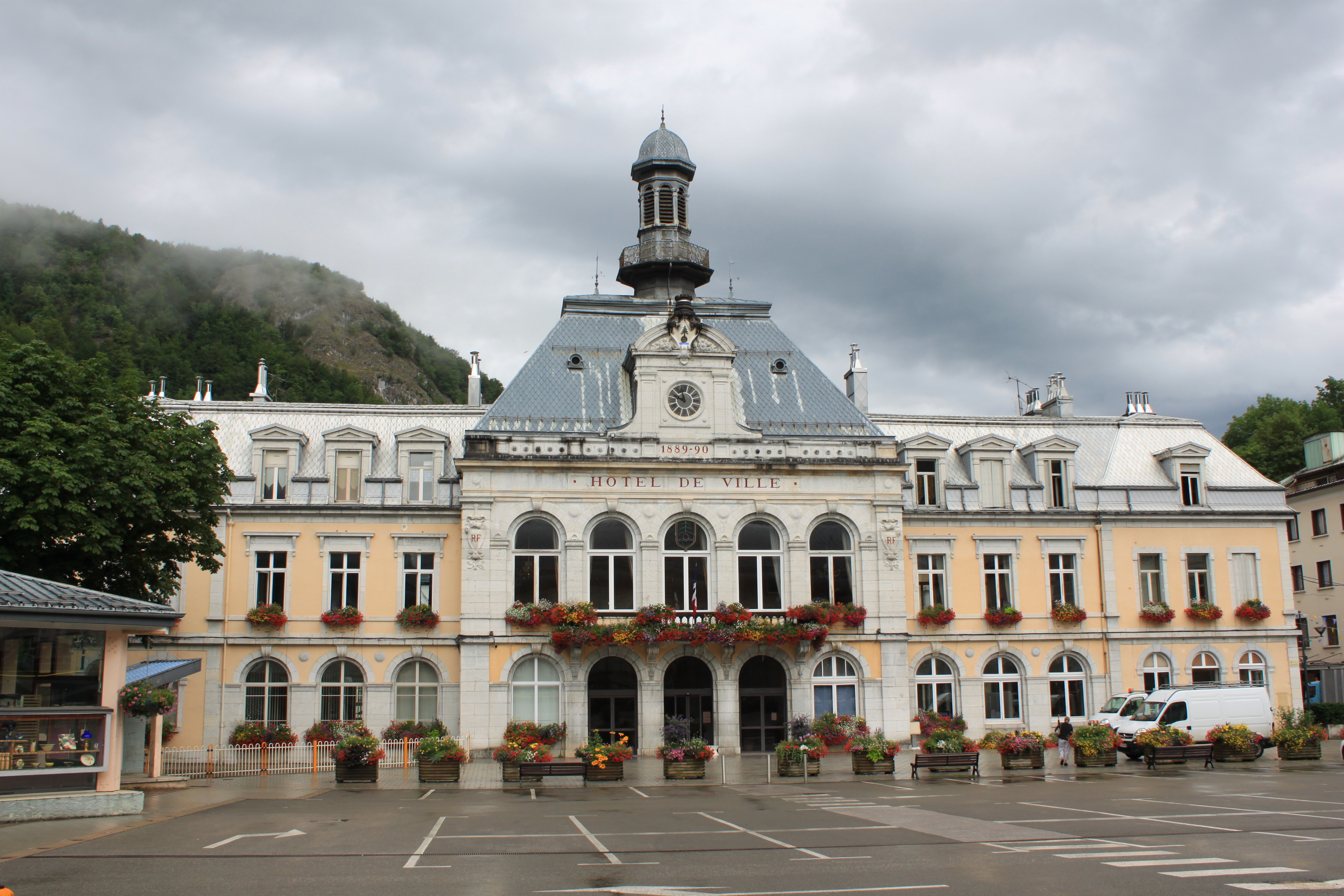 hotel de ville de Morez, Morez, France.